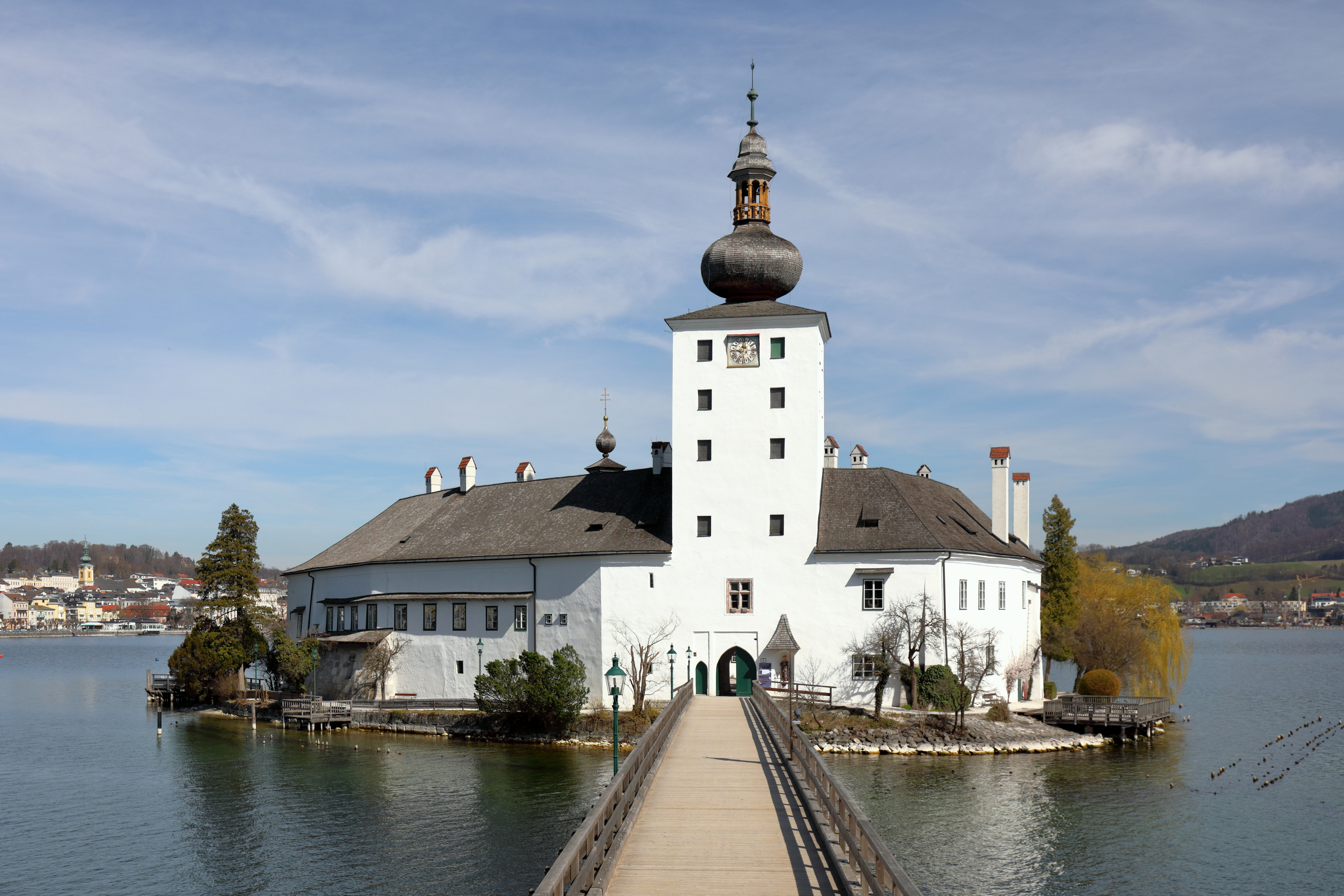 Südwestansicht des Schlosses Ort und im Hintergrund die oberösterreichische Stadtgemeinde Gmunden.Das Schloss befindet sich auf einer Insel im Traunsee und zählt zu den ältesten Gebäuden des Salzkammergutes. Ursprünglich war das Schloss eine Wasserburg, wurde jedoch nach dem Brand 1626 in der heutigen Form wiedererrichtet.